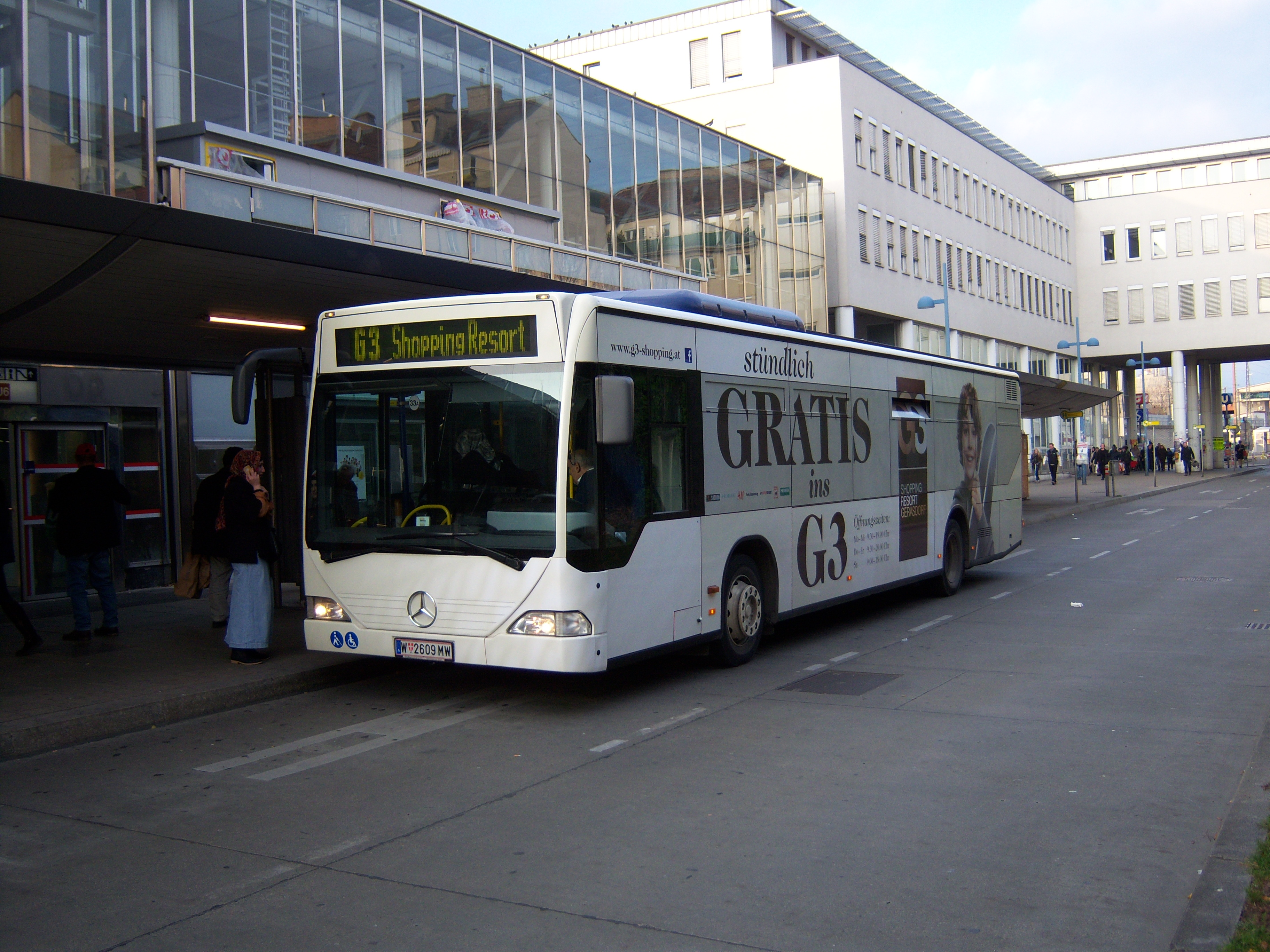 Ein Mercedes-Benz Citaro-Bus beim Bahnhof Floridsdorf, eingesetzt im Shuttleverkehr zum G3 Shopping Resort